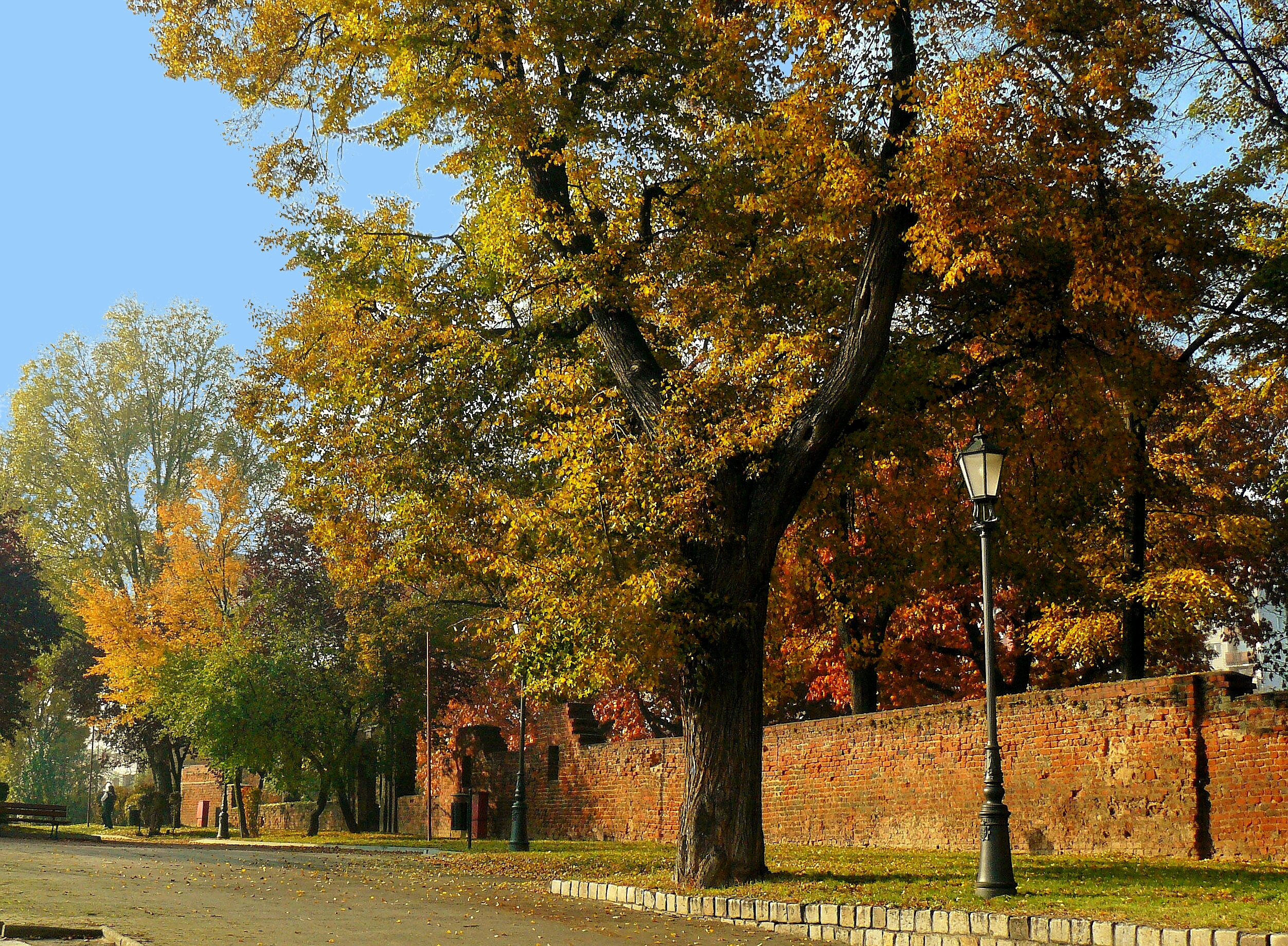 Głogów - obwarowania miejskie: mury obronne przy zamku (zabytek nr A/2643/668)